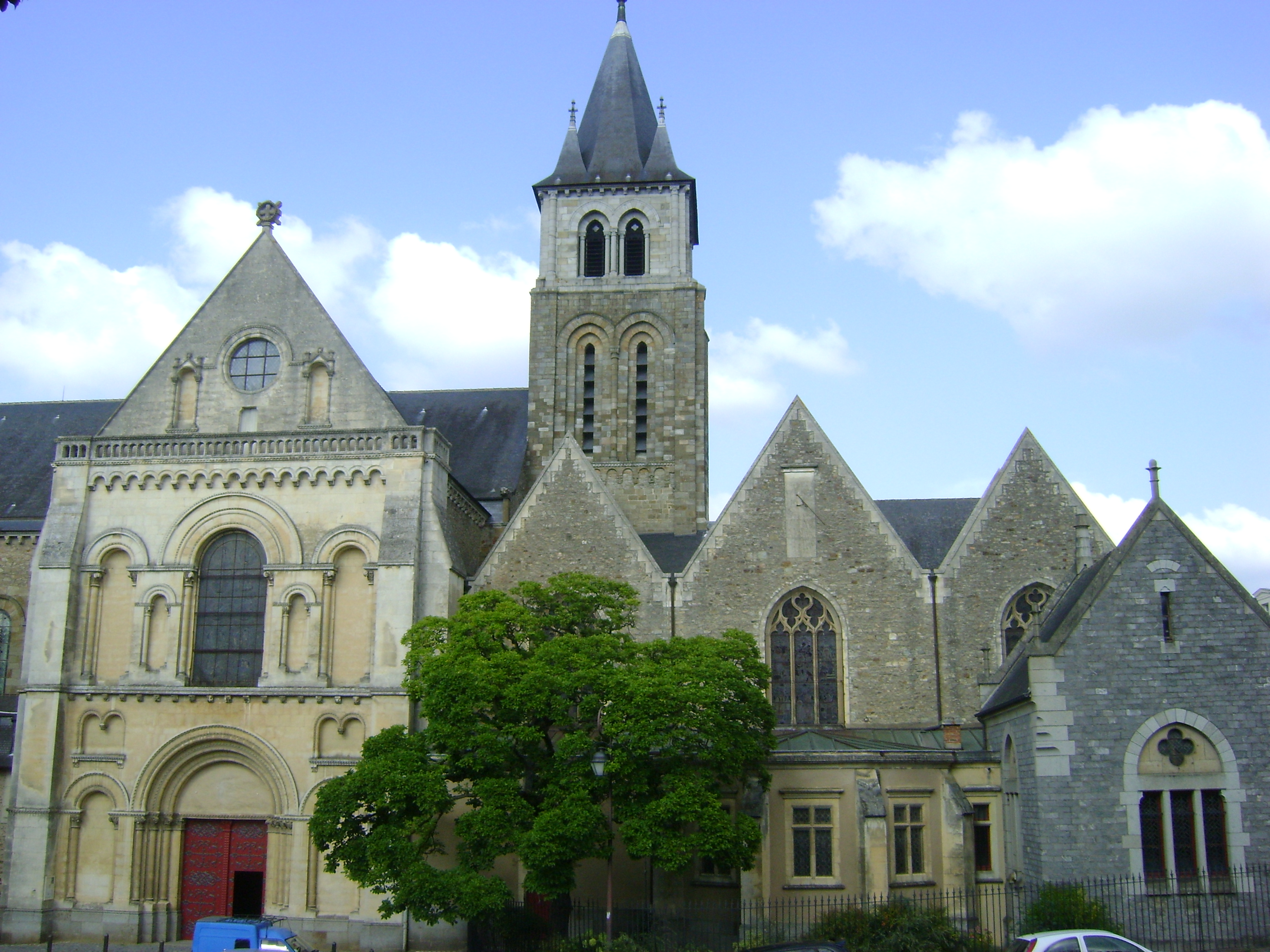 Cathédrale de la Sainte-Trinité de Laval, Mayenne. Façade occidentale. .